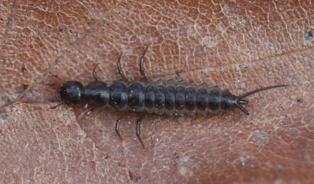 Larve der Gattung Nebria (vermutlich Nebria brevicollis oder Nebria salina) am 28. Februar 2019 in der Schwetzinger Hardt